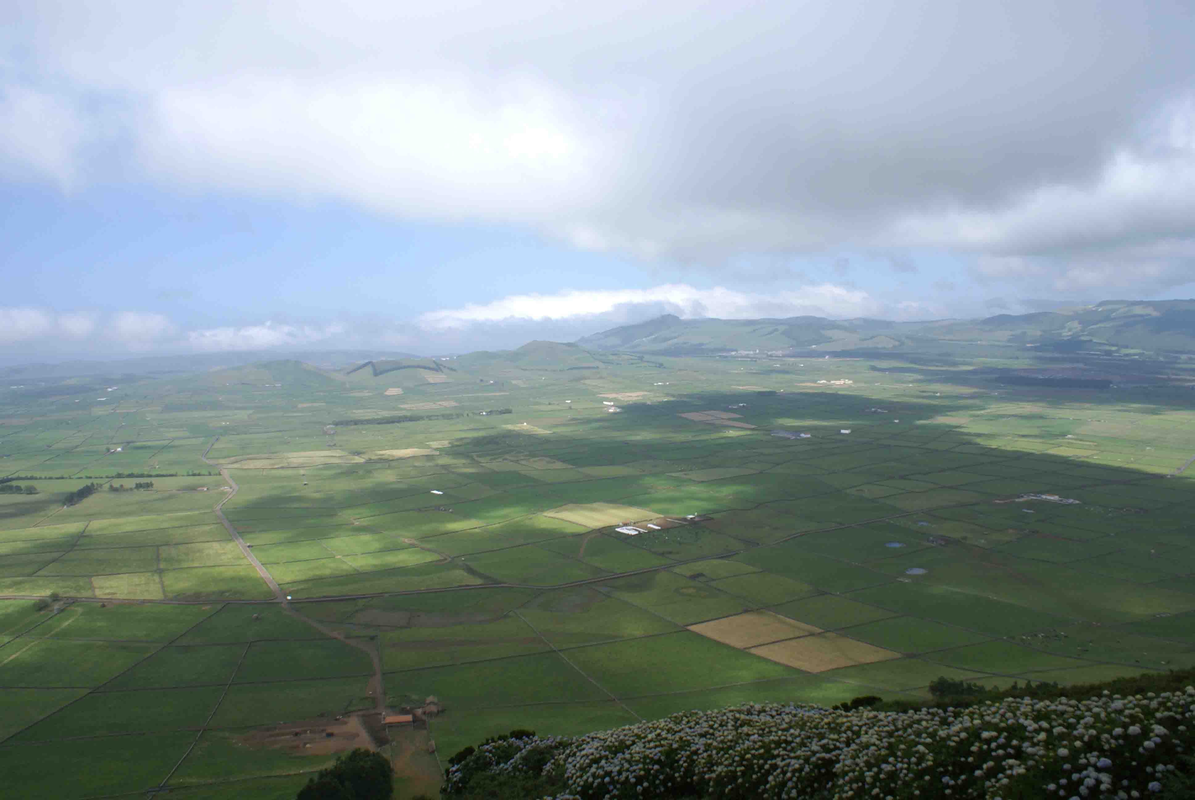 Achada, interior da ilha Terceira, Açores, Portugal